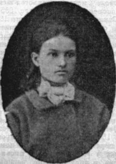 Sof'ja Nikolaevna Bogomolec (1856-1889)